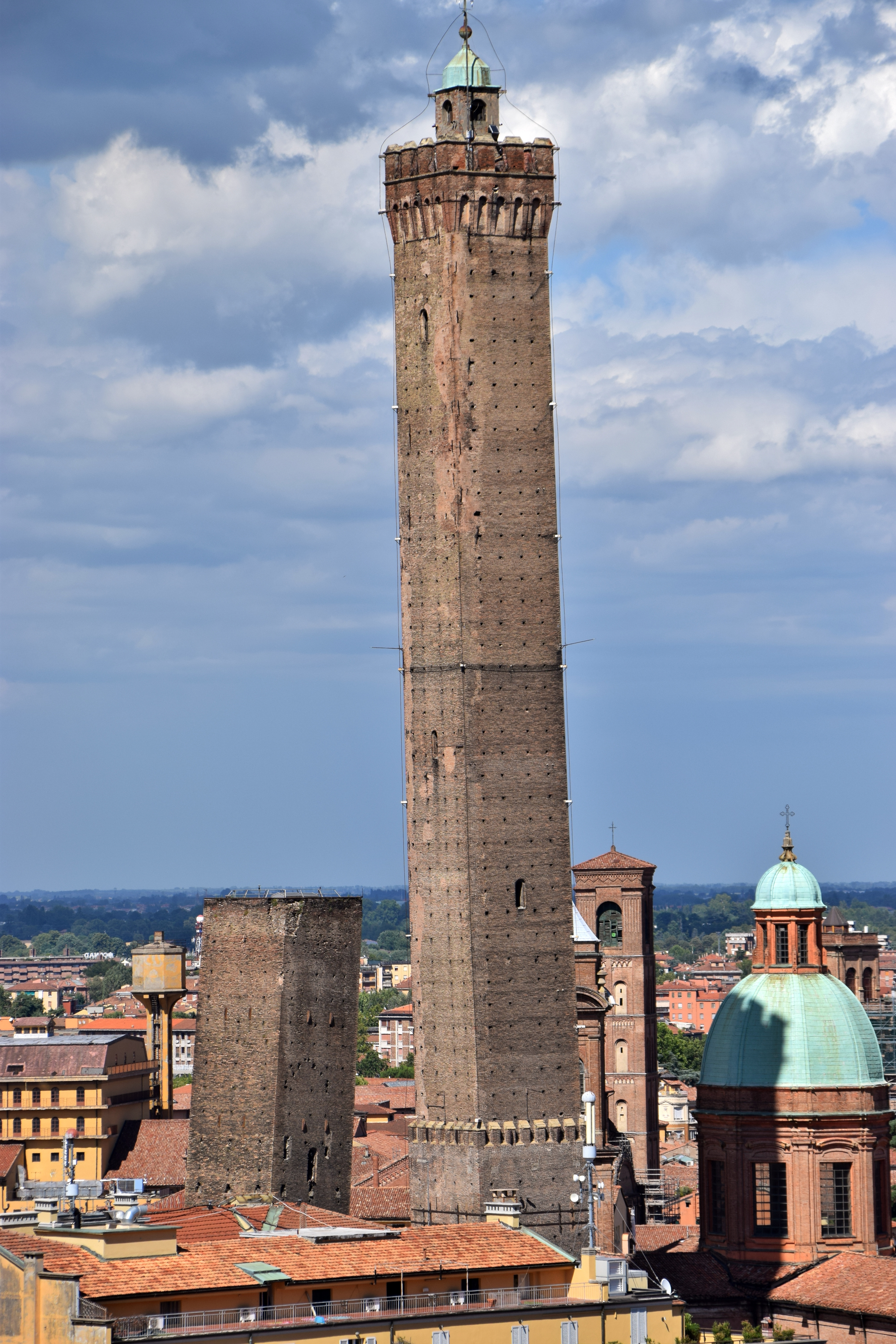 En el s.XII las familias ricas de esta ciudad mostraban su poder mediante la altura de sus torres. La ciudad medieval estaba repleta de estas torres a modo de rascacielos medievales. Varias de estas torres han llegado a nuestros días, siendo la Torre Asinelli y la Torre Garisenda las más famosas de ellas. Las dos torres están inclinadas y se han convertido en el símbolo de esta ciudad. La torre Asinelli es la más alta y mide 97,6 metros. Tiene una inclinación de 1,3 metros y dispone de un mirador en la parte superior. Para llegar a él hay que ascender 498 escalones. La torre Garisenda está más inclinada (3,2 metros) y mide 48 metros de altura. Su inclinación es tal que su altura tuvo que ser recortada en el s.XIV para evitar su derrumbe. Dante Alighieri hace referencia a ella en uno de los cantos del Infierno en la Divina Comedia.